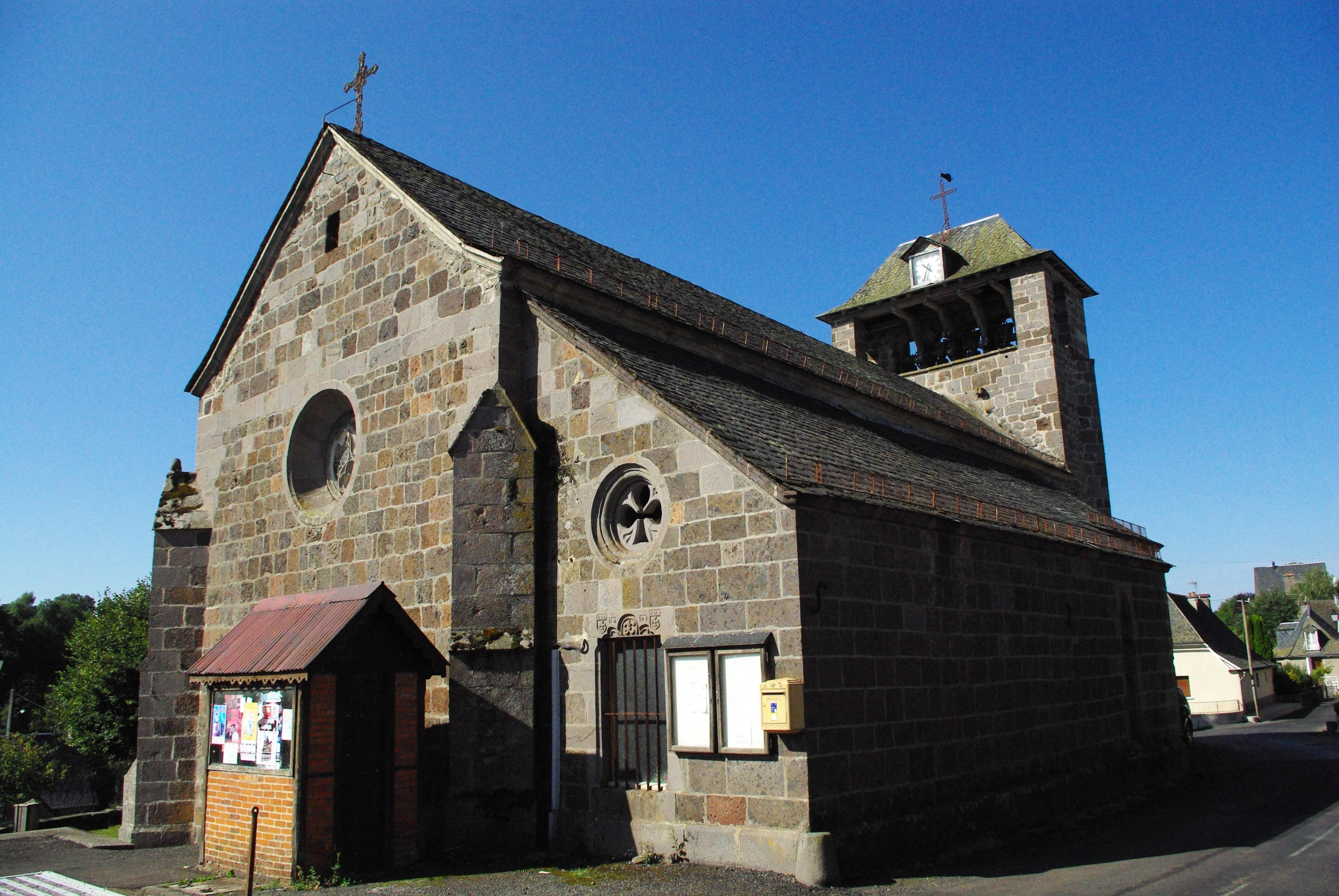 Église Saint-Saturnin